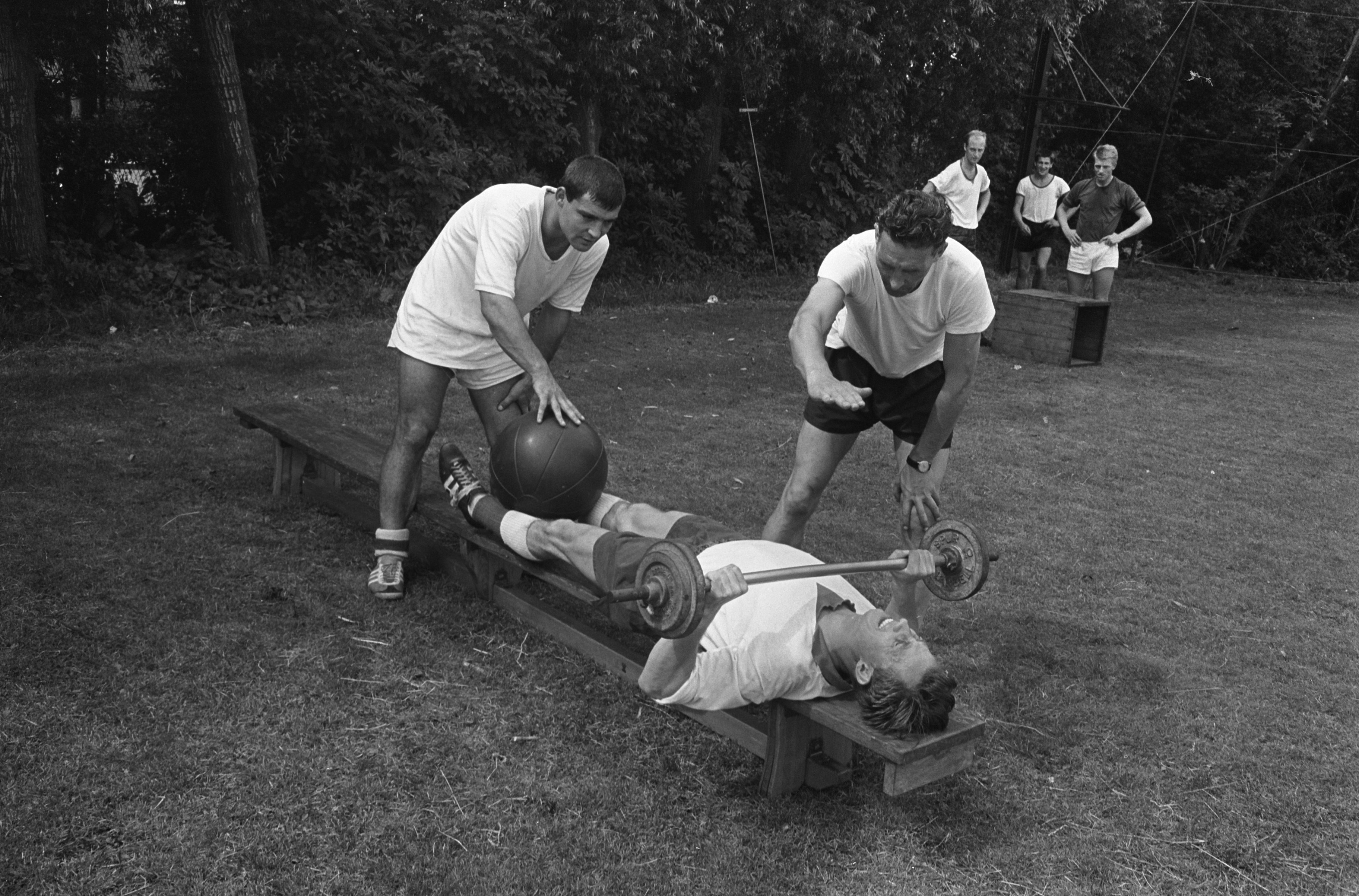 Training Sparta, op de bank Ole Madsen , rechts trainer Thompson en links Laseroms. Datum 7 augustus 1965